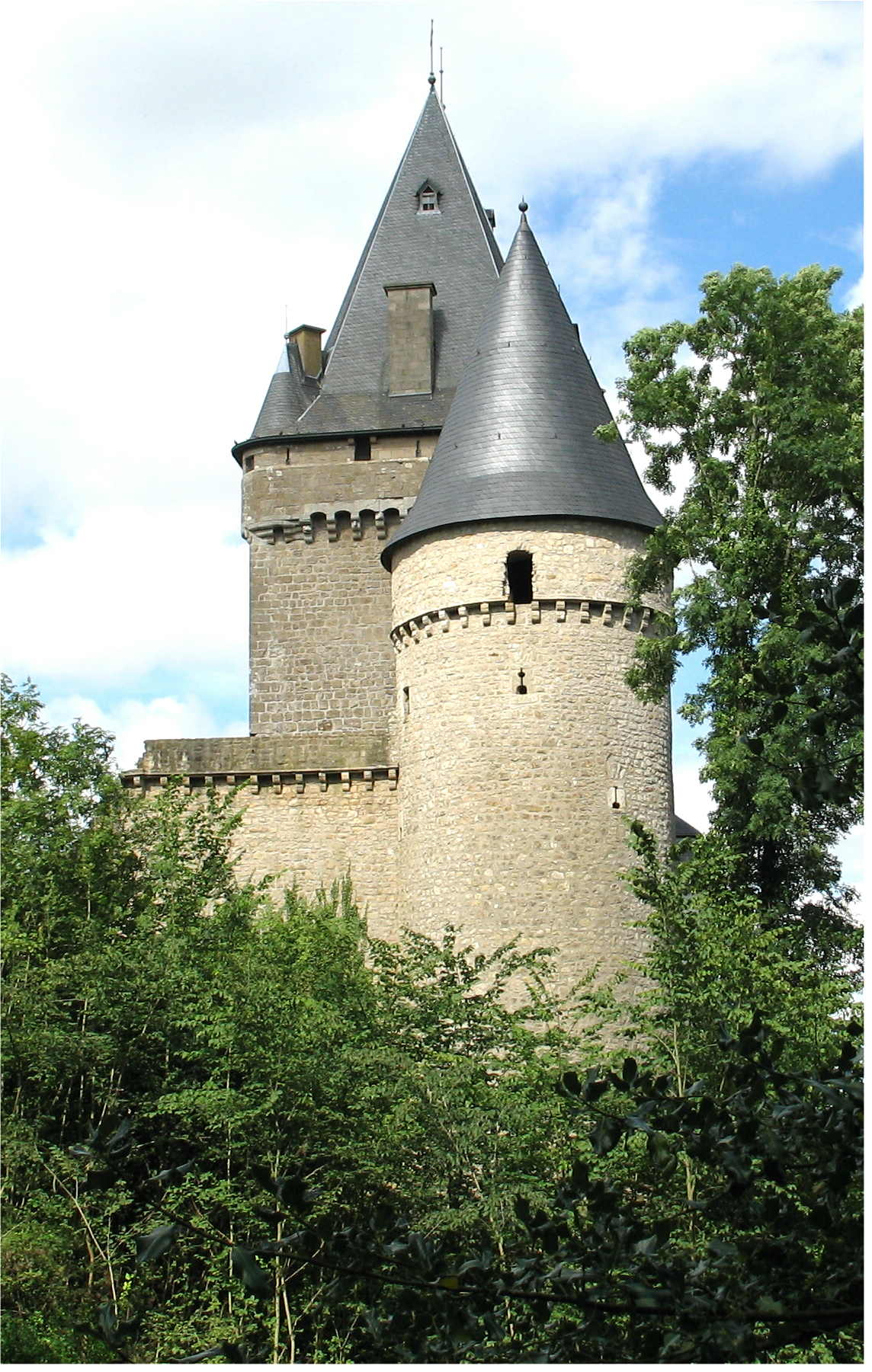 Le chàteau de Hollenfels